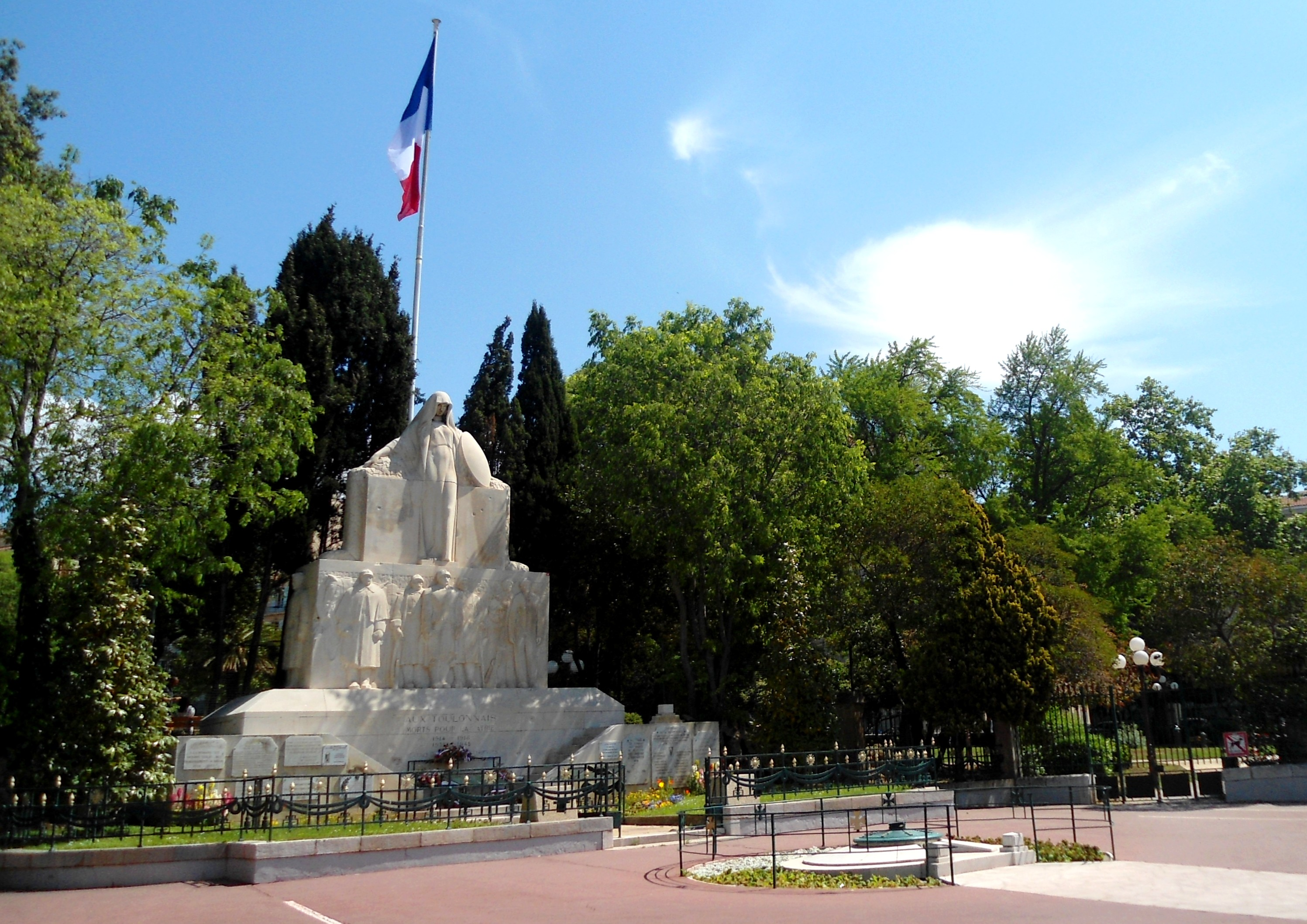 Monument dei mòrts, Tolon